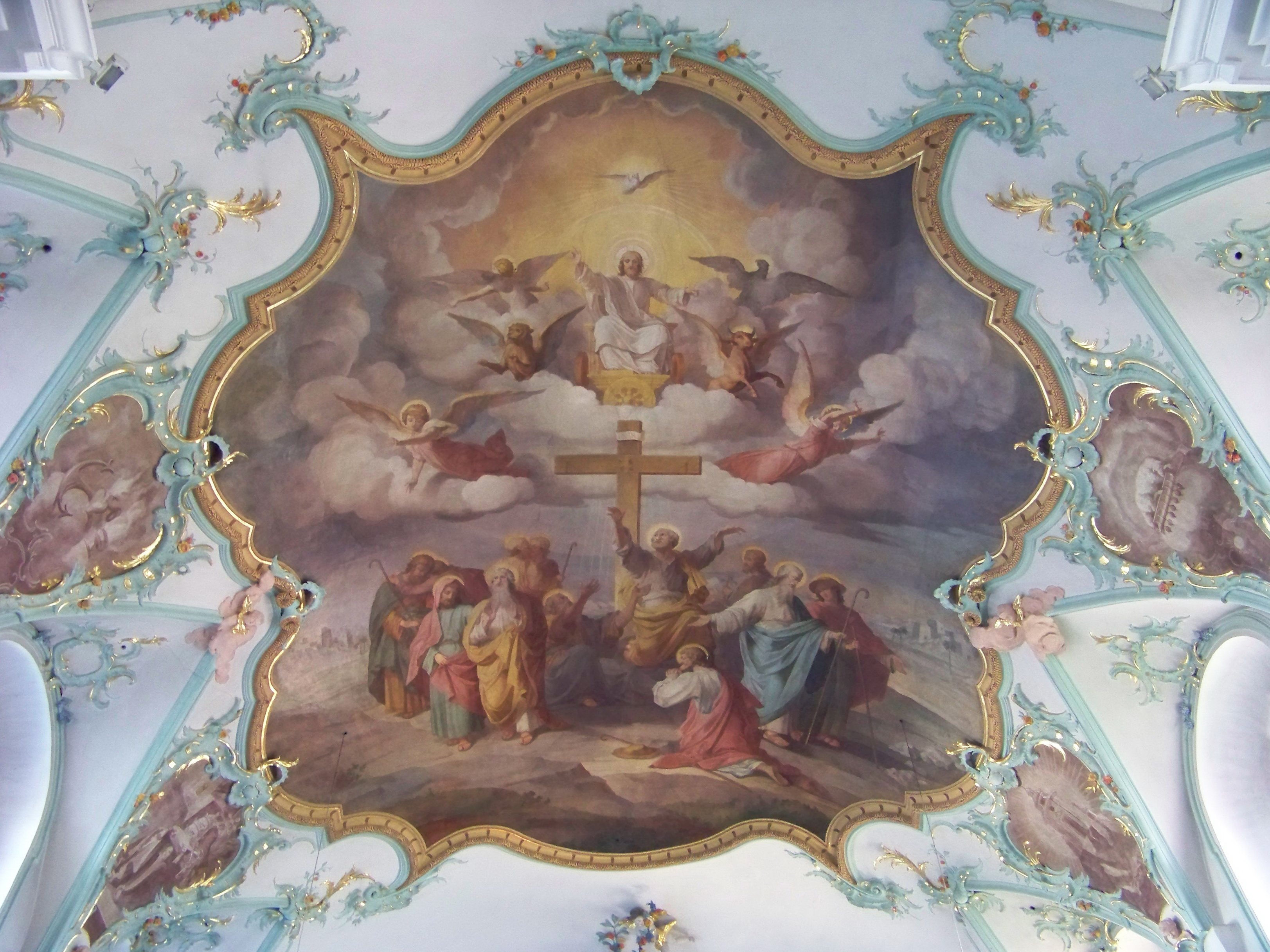 Geiselhöring, Schlossgraben 17. Katholische Stadtpfarrkirche St. Petrus und Erasmus. Barockes Langhaus, 1761-64 von Georg Fischer. Deckenfresko im Chor.